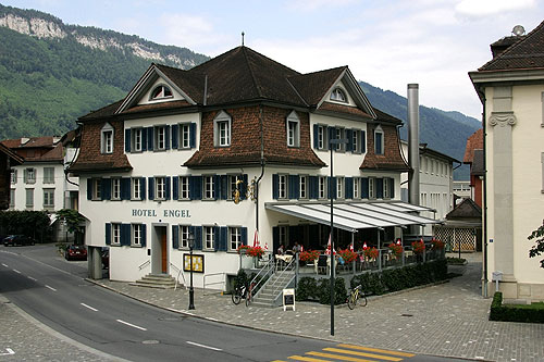 Stans: Hotel "Engel"